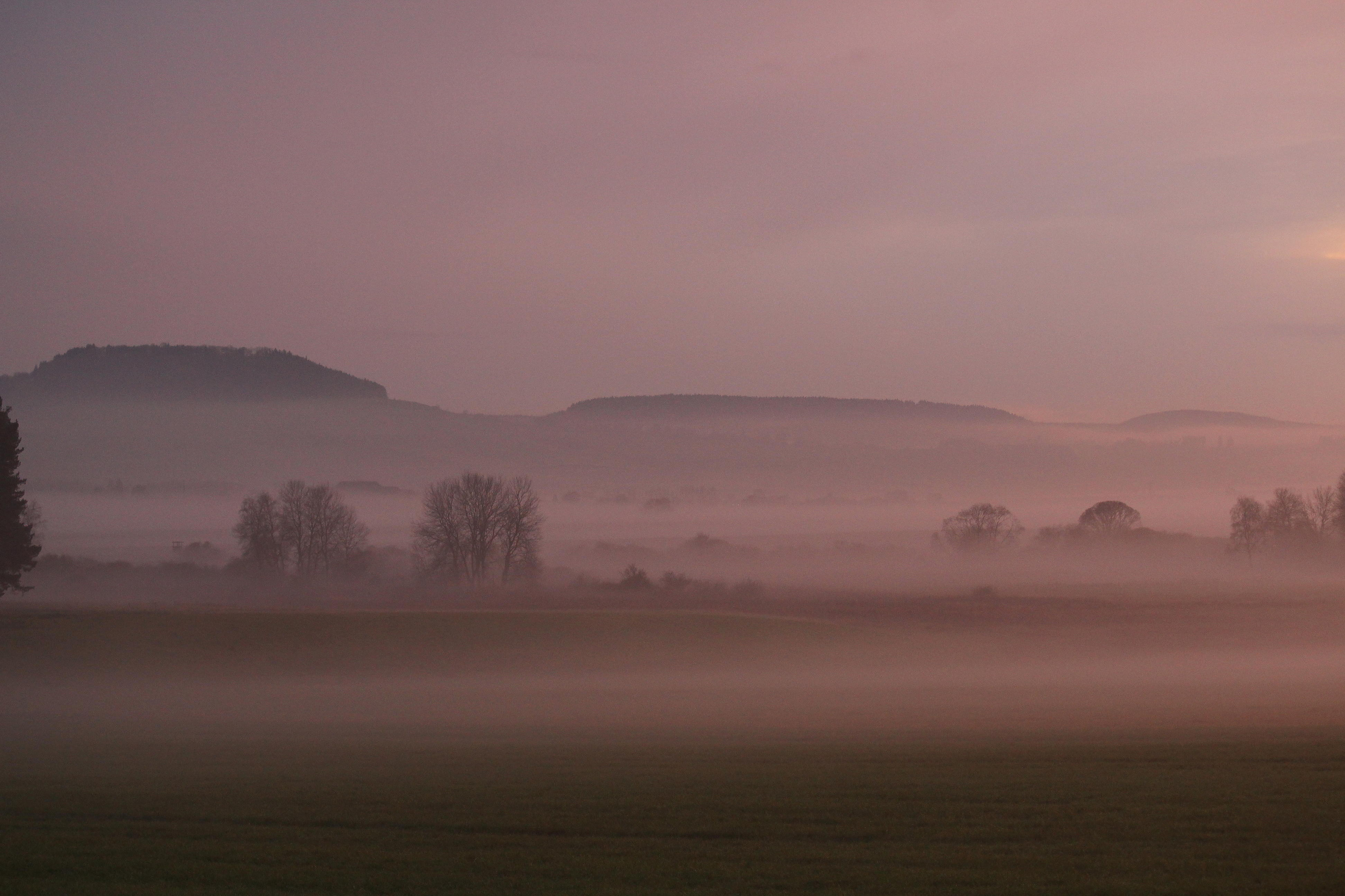 Nebel im NSG Birken-Mittelmeß. Blick in südlicher Richtung in Richtung Donau und Fürstenberg.